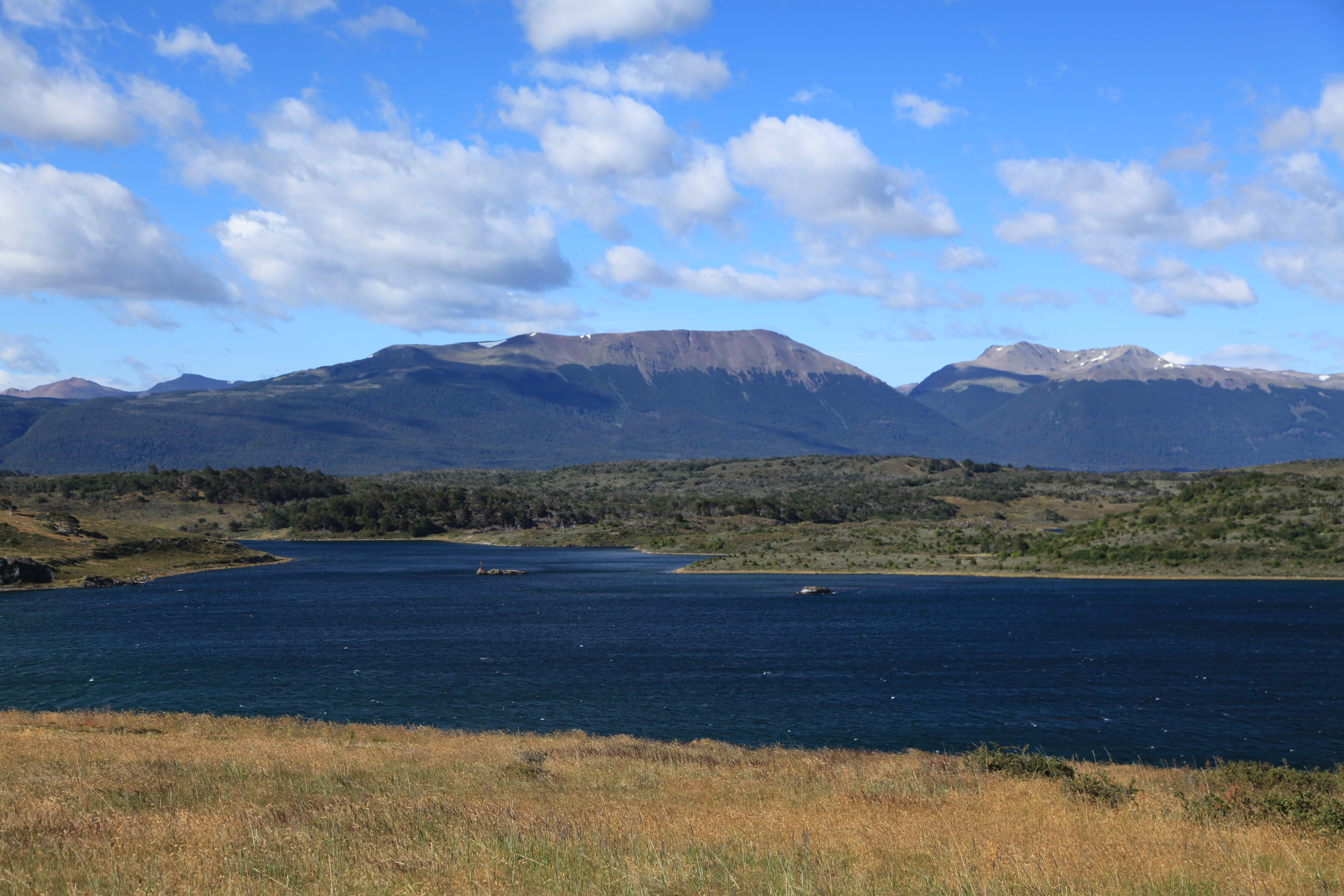 Countryside near Estancia Harberton